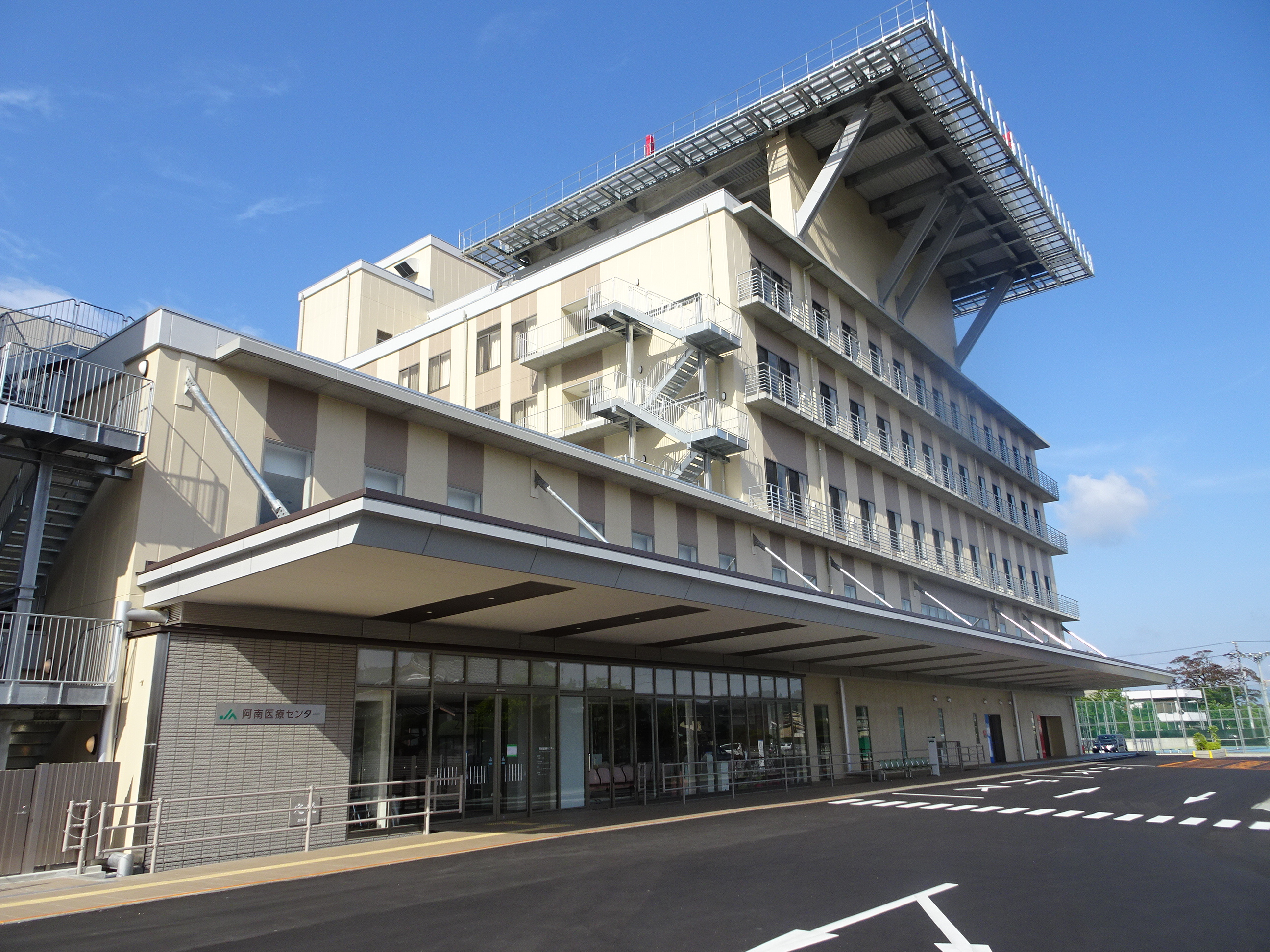 阿南医療センター